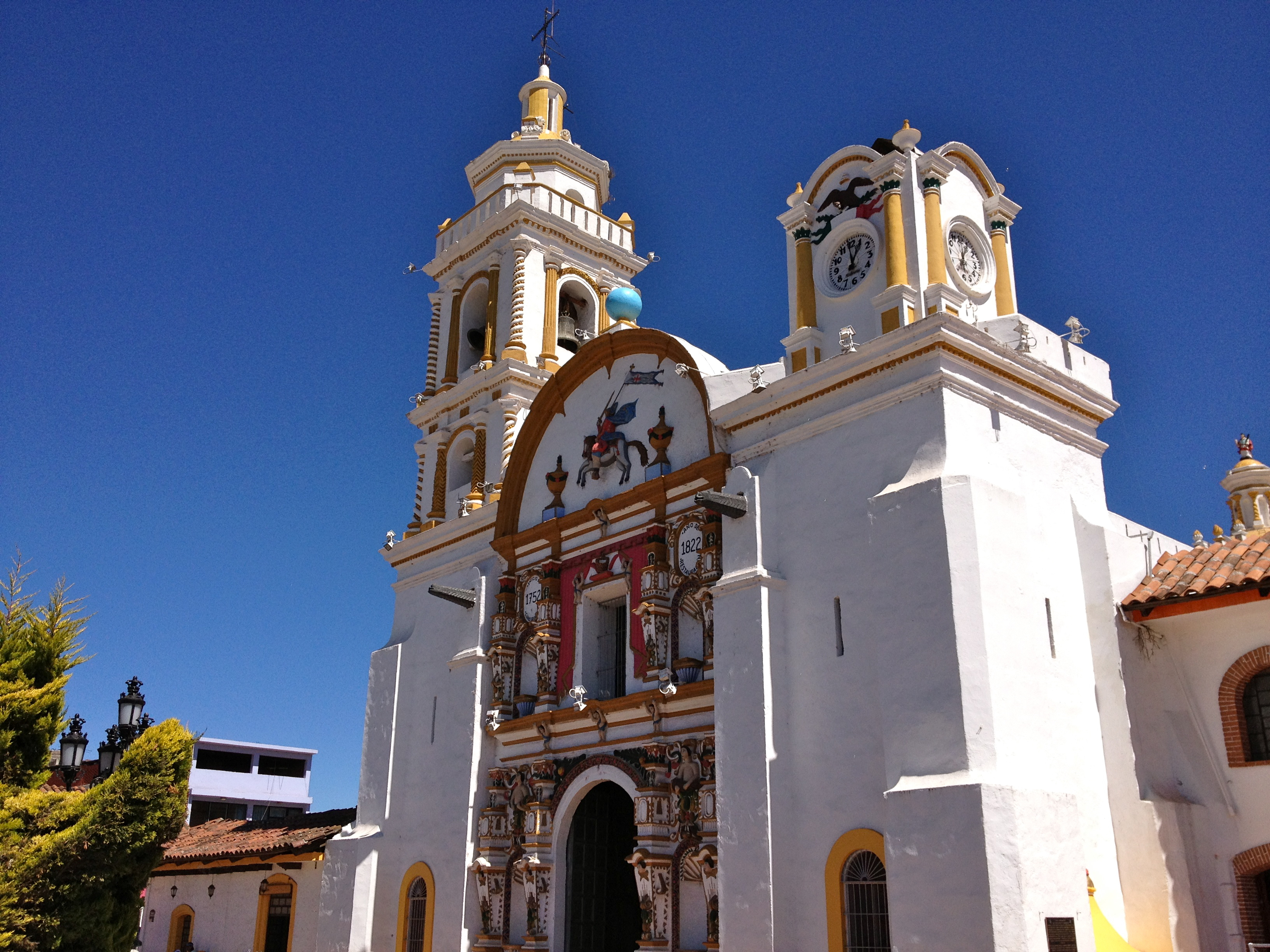 Conjunto Parroquial de Santiago Apóstol